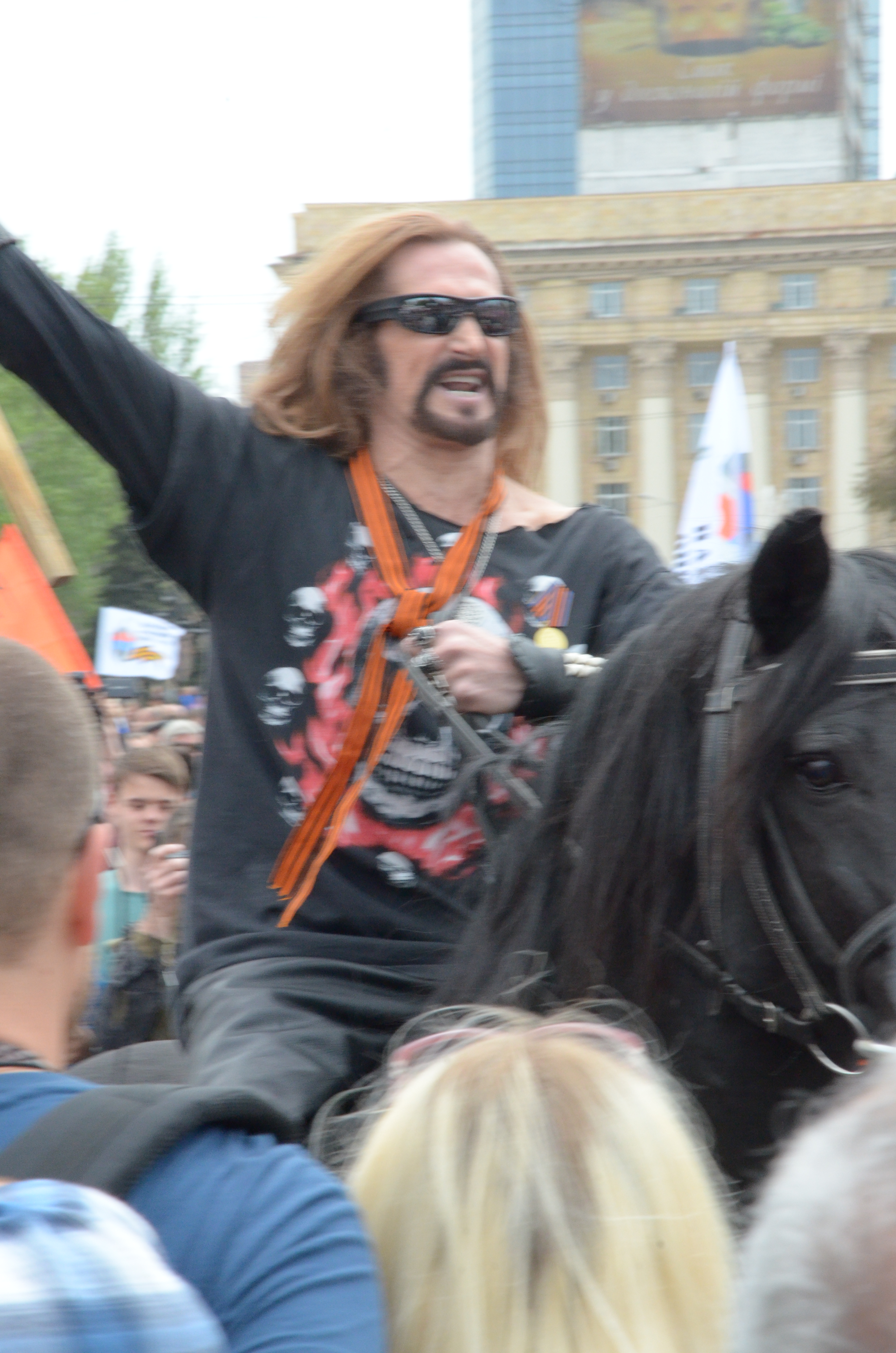 День Победы в Донецке